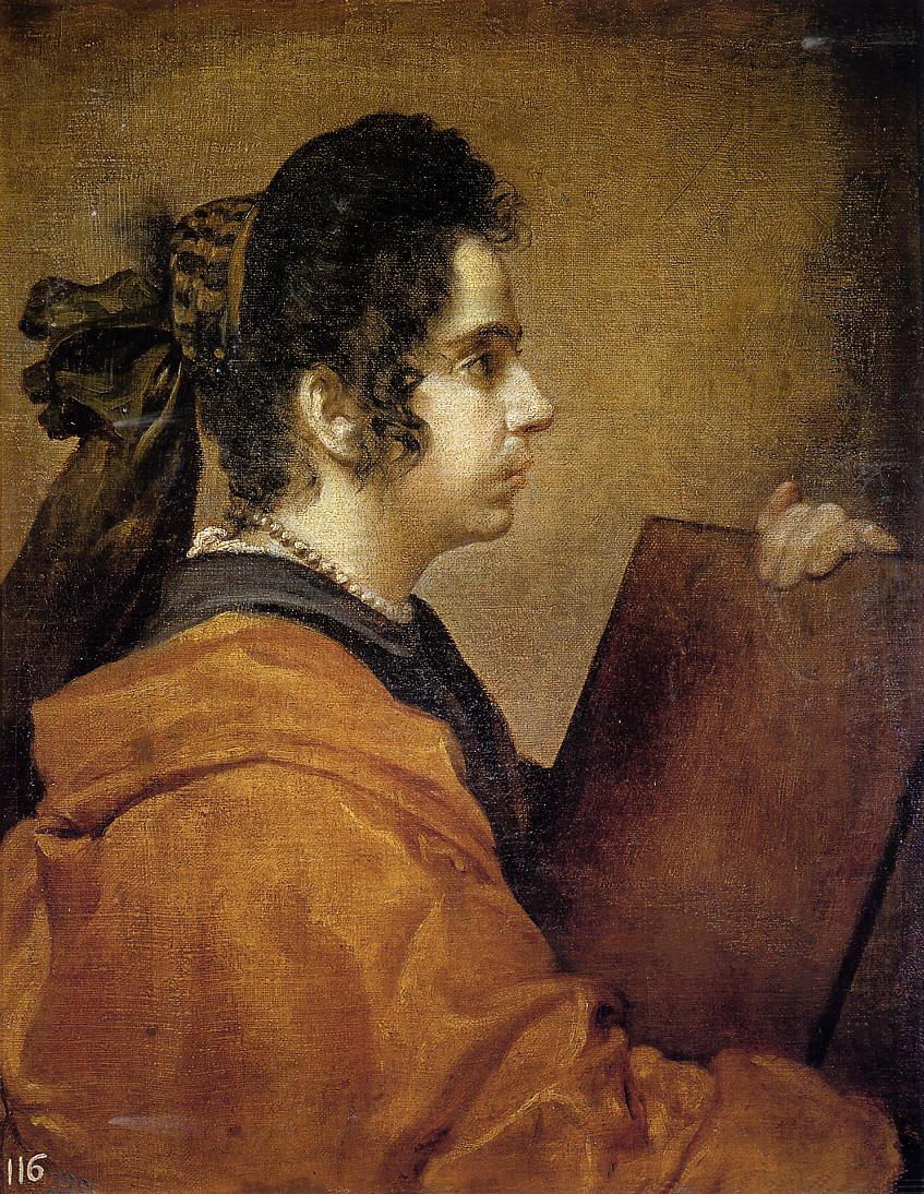 La obra representa a Sibila, un personaje de la mitología grecorromana.